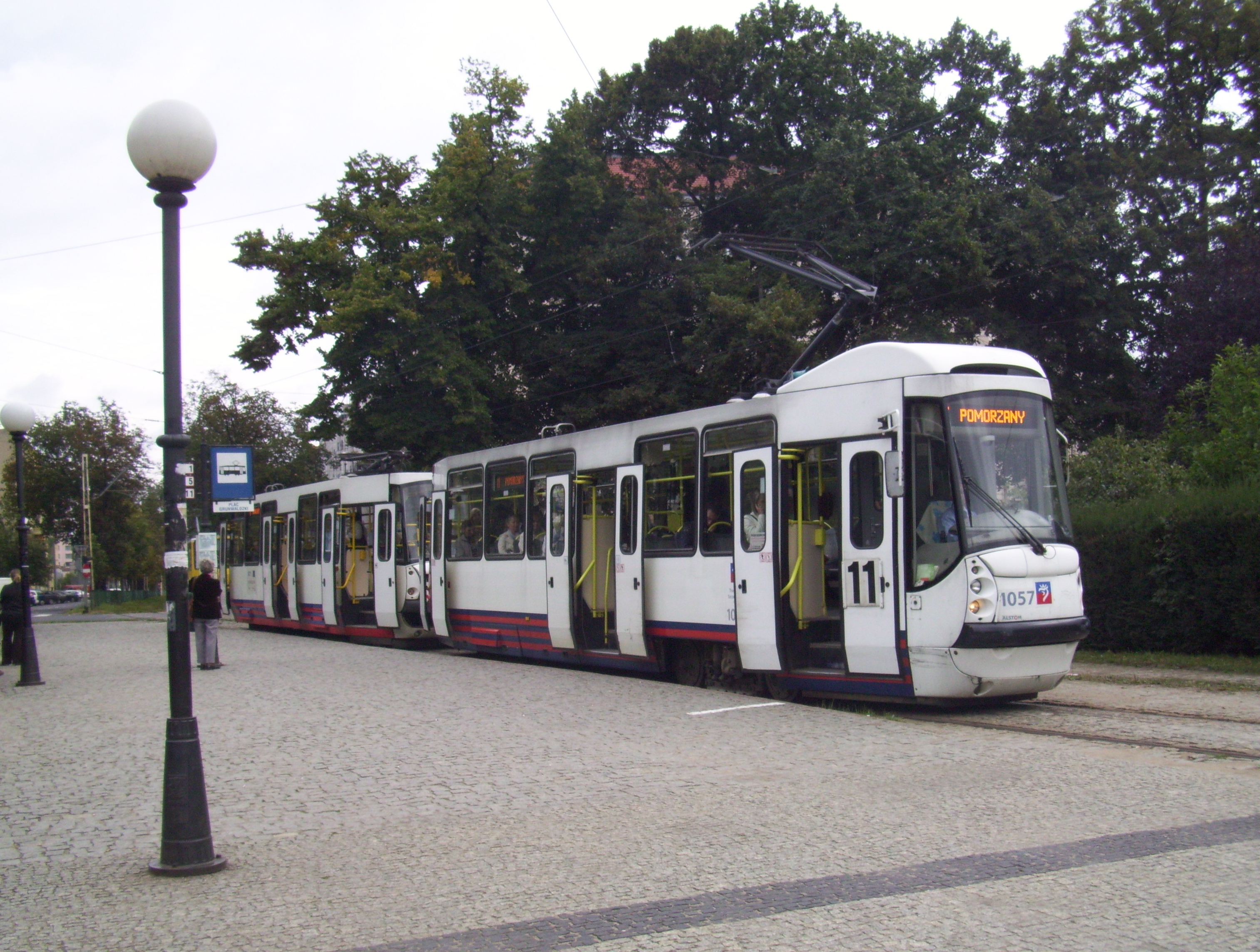 Modernizowany Konstal 105Na (bulwa)